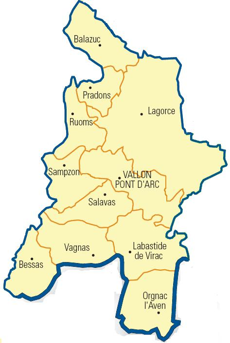 Carte détaillée des communes du canton (Ardèche)